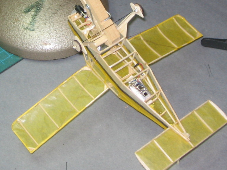 Vue de dessous d'un modèle à l'échelle pistachio d'un BD4, envegure 8" poids 4g